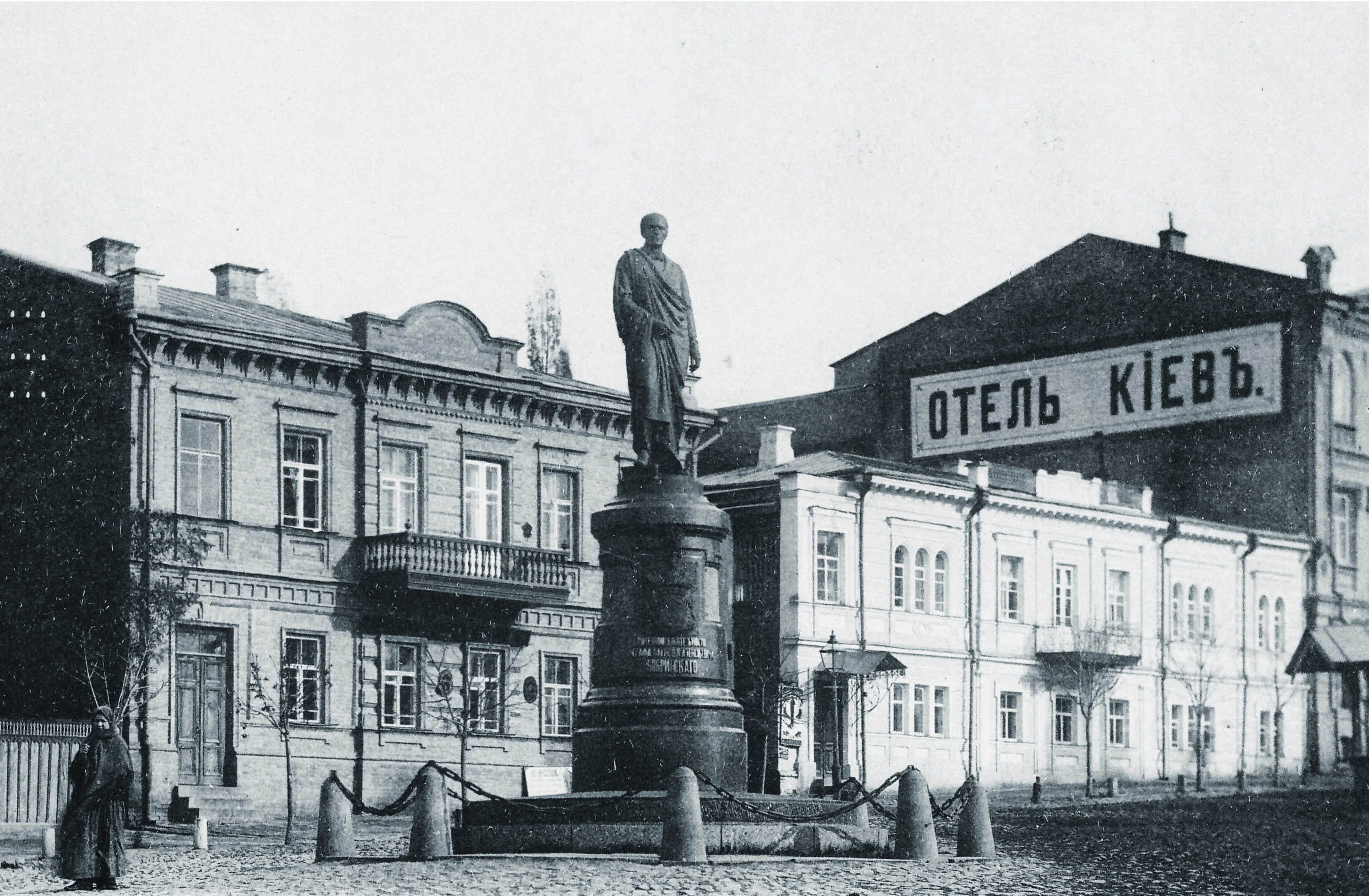 Будинки № 40, 38 і 36 (готель «Київ») на бульварі Тараса Шевченка. Київ